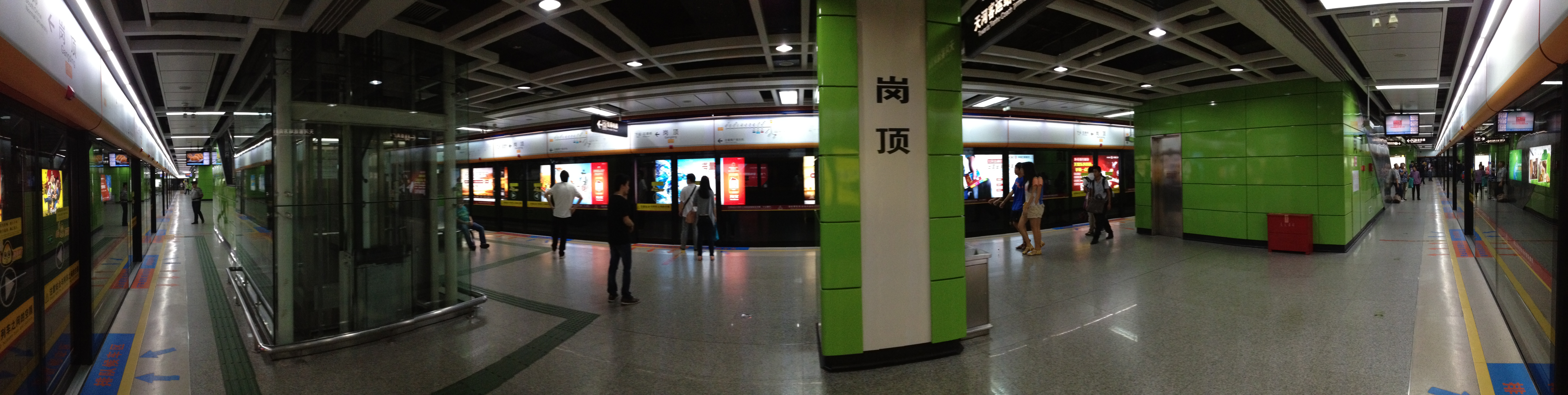 广州地铁岗顶站月台全景图